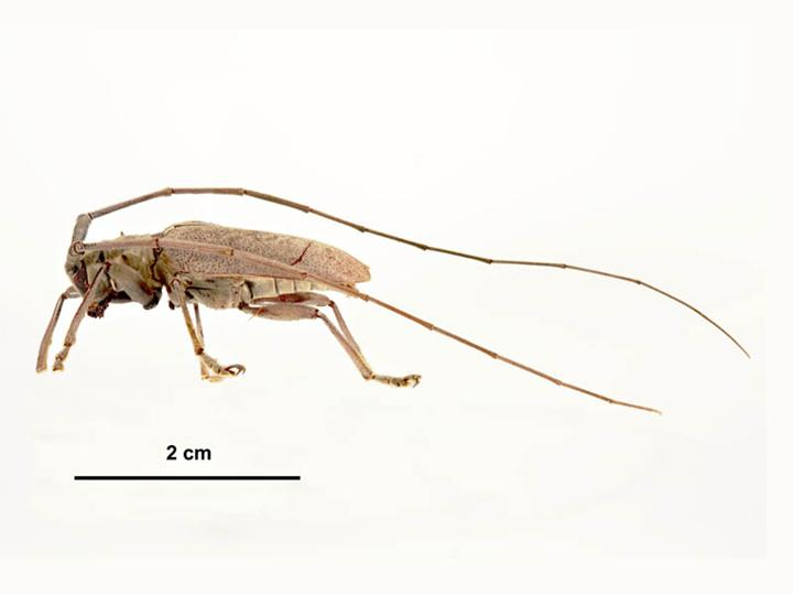 Acalolepta vastator male, lateral view